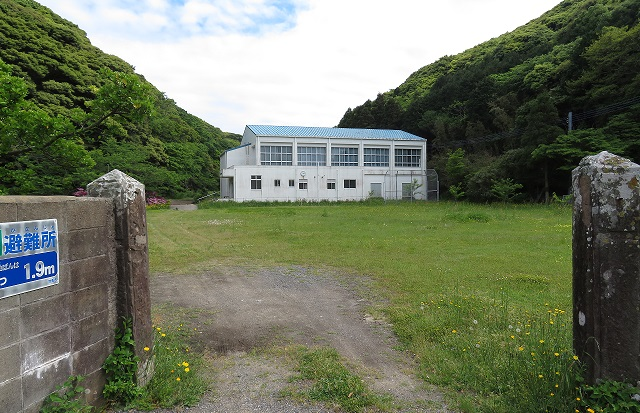 美津島町立大船越小学校緒方分校跡